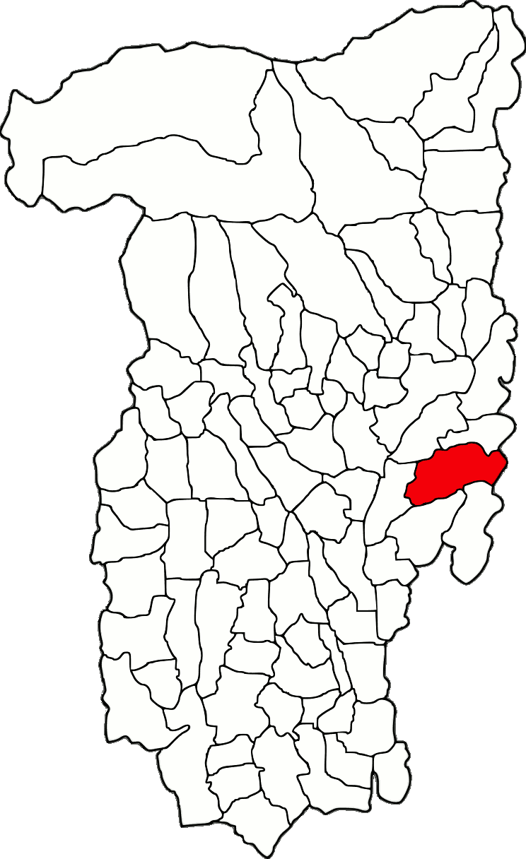 Lage der Gemeinde Nicolae Bălcescu im Kreis Vâlcea (RO).